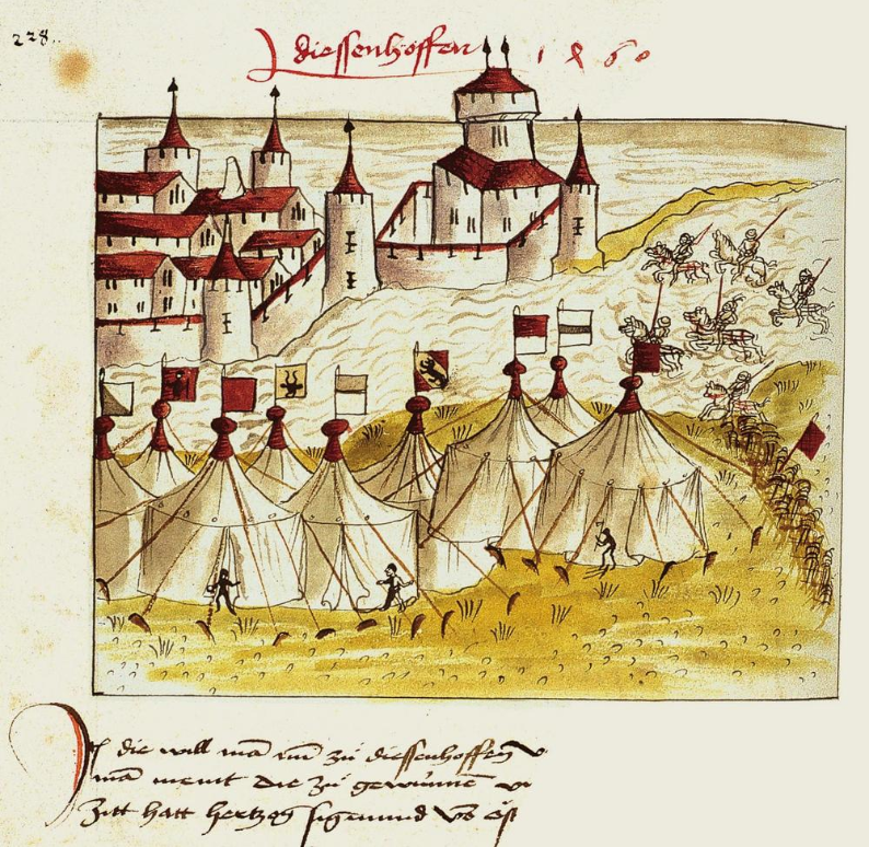 Das Lager der Eidgenossen vor den Toren der Stadt Diessenhofen im Jahr 1460. Illustration aus der Zürcher Chronik, begonnen 1485 von Gerold Edlibach (Zentralbibliothek Zürich, Ms. A 75, S. 228).